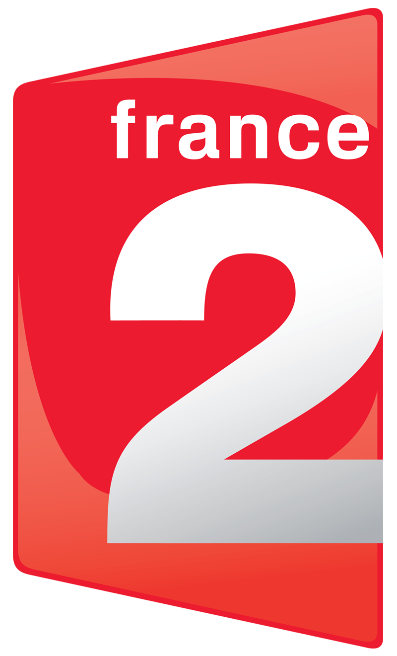 Logo von France 2 seit 2008